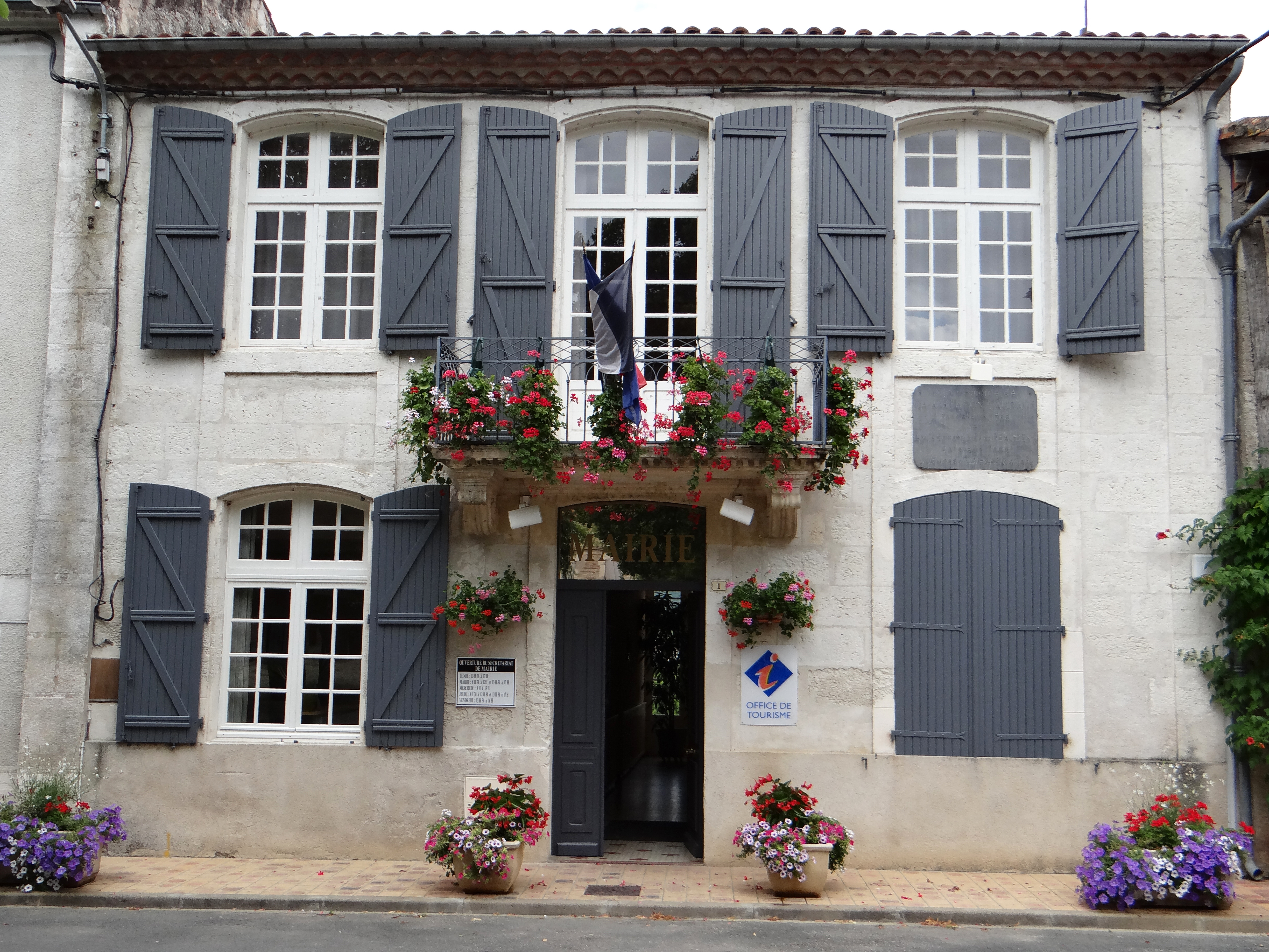 Granges-sur-Lot - Mairie